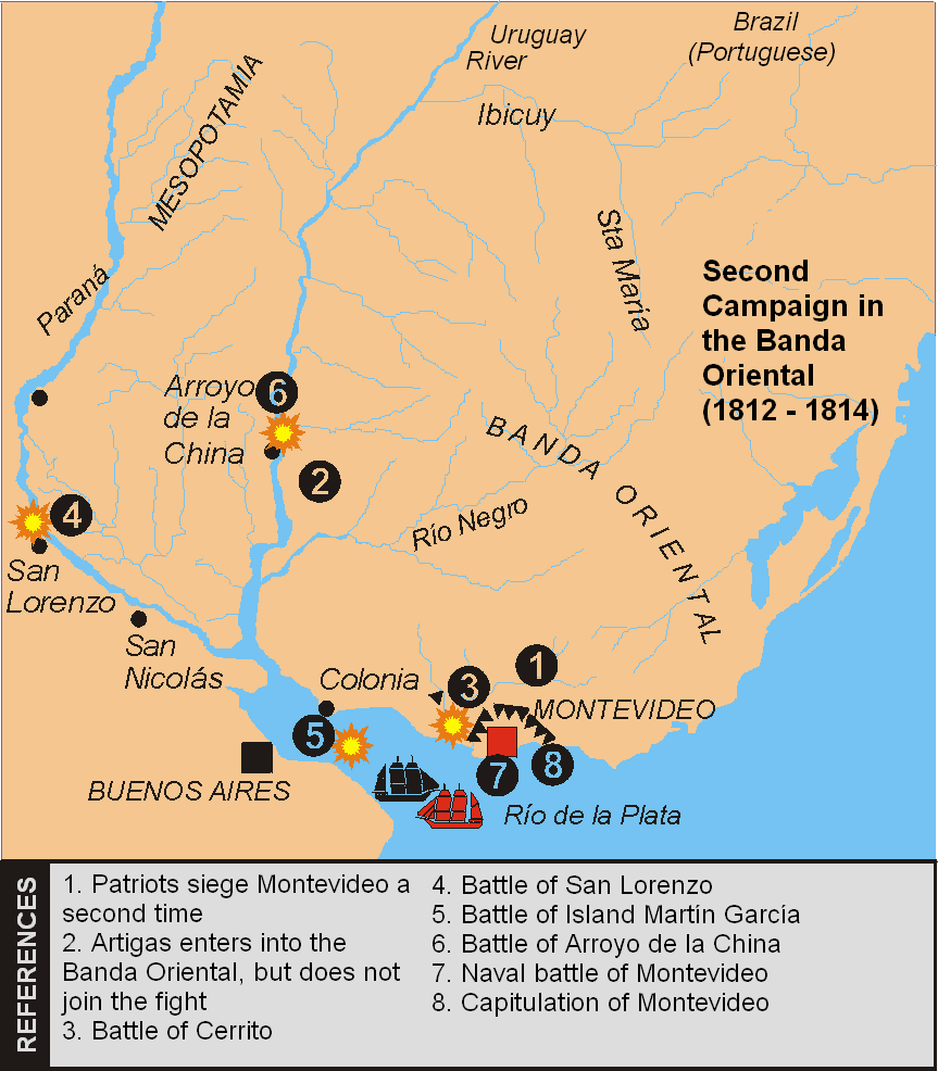 Operaciones militares en la Banda Oriental y región litoraleña, 1812-14 - Military actions in eastern scenario (actually Uruguay and Argentina)